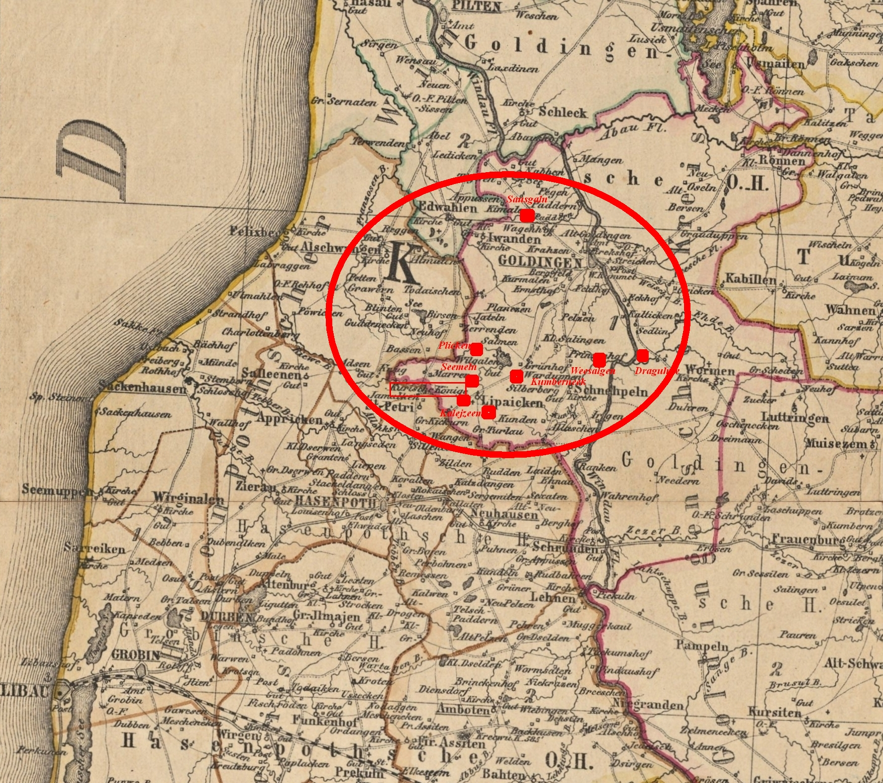 Position der bis zu 8 Orte der Kurischen Könige, eingezeichnet in einen Ausschnitt der Rückerschen Karte "Baltikum nach Rücker 1890.jpg"